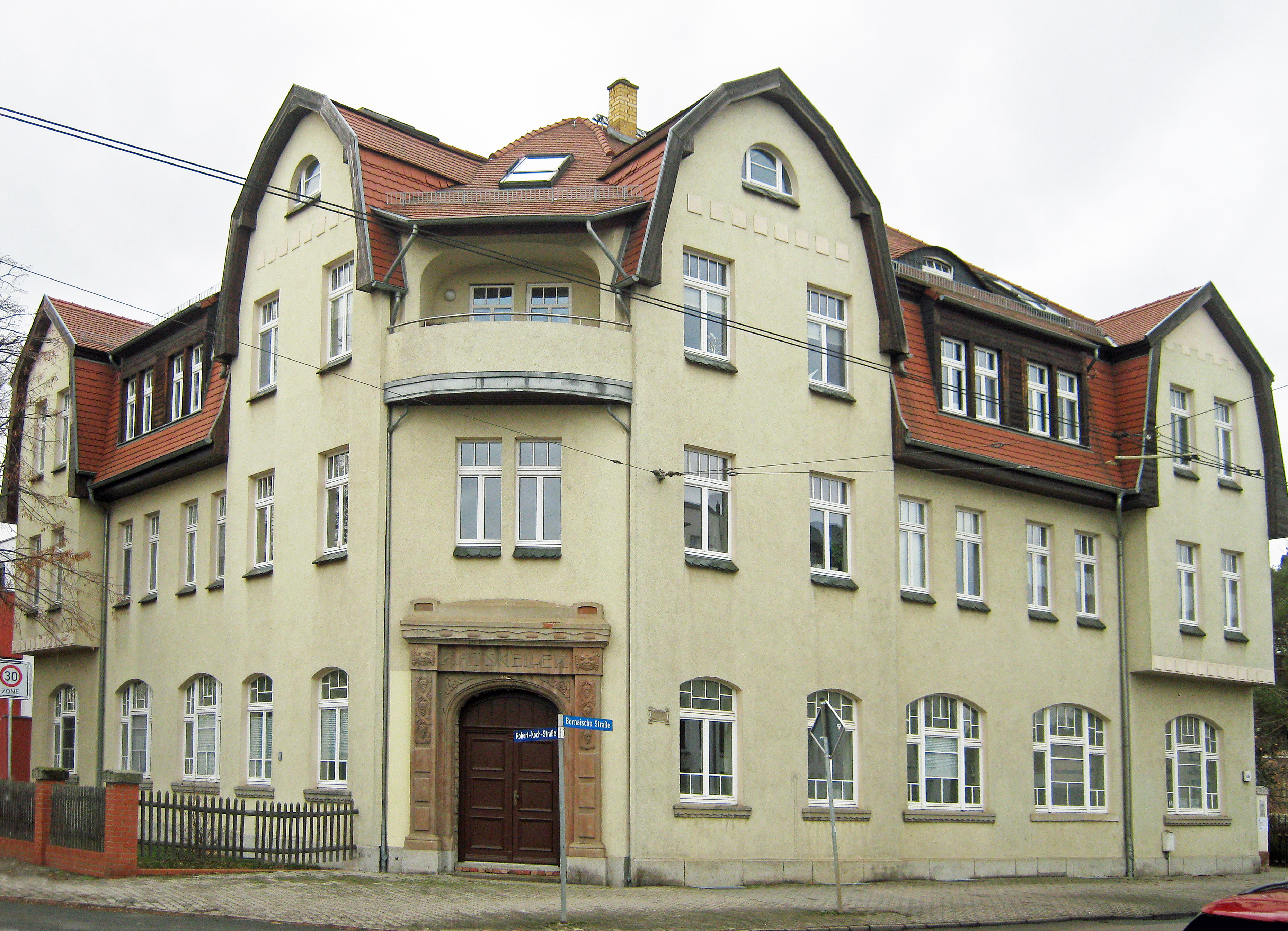 Das heutige Mietshaus mit der Adresse „Bornaische Straße 46“ in Markkleeberg war bis zum Zusammenschluss von Markkleeberg und Oetzsch das Rathaus des Ortes Markkleeberg. Das Rathausgebäude verfügte auch über einen Ratskeller. Das Gebäude wurde vom Architekten Arthur Jäger gebaut.